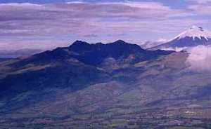 Volcano Ruminahui, Ecuador